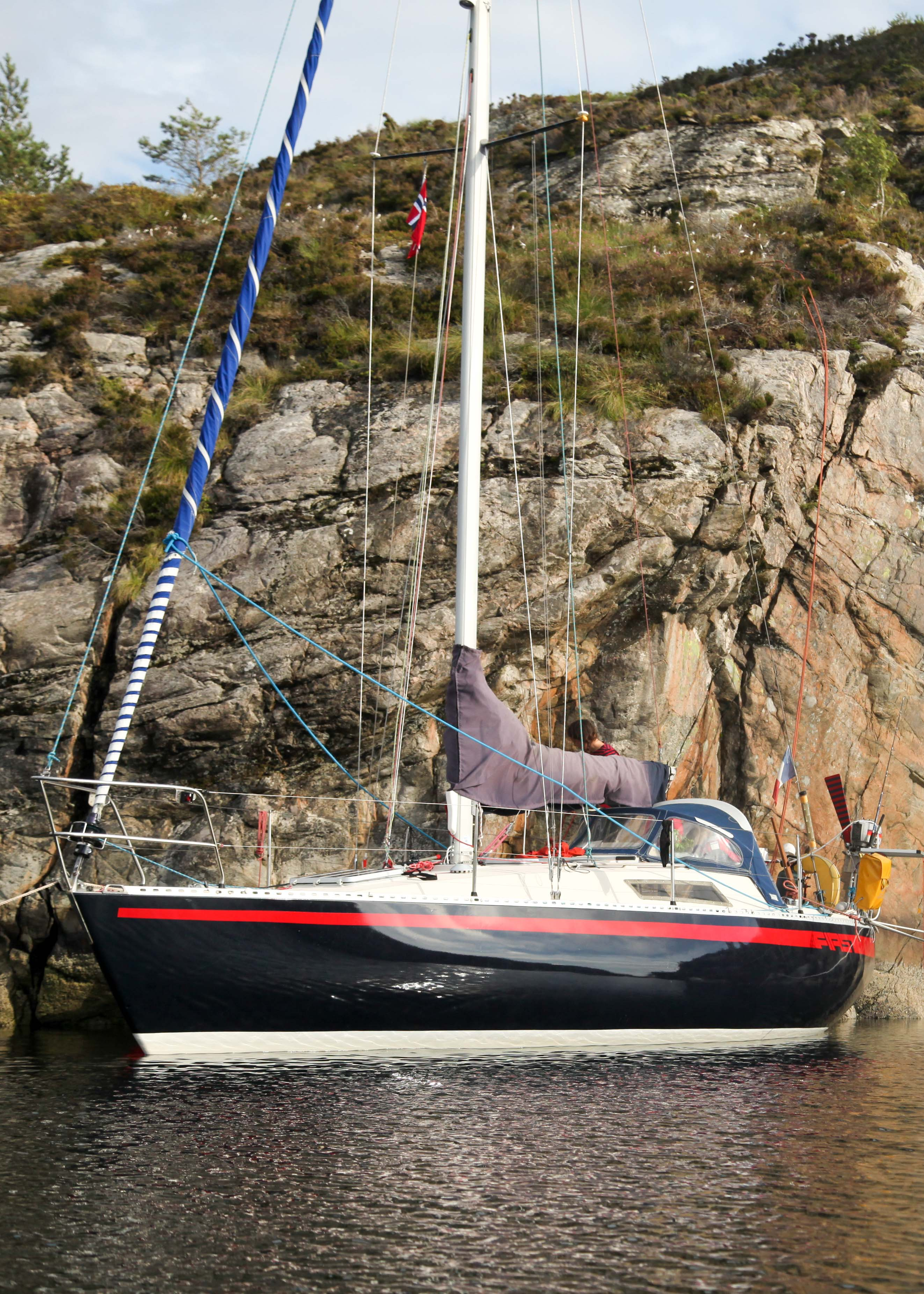 Bateau First 30 de chez Bénéteau.